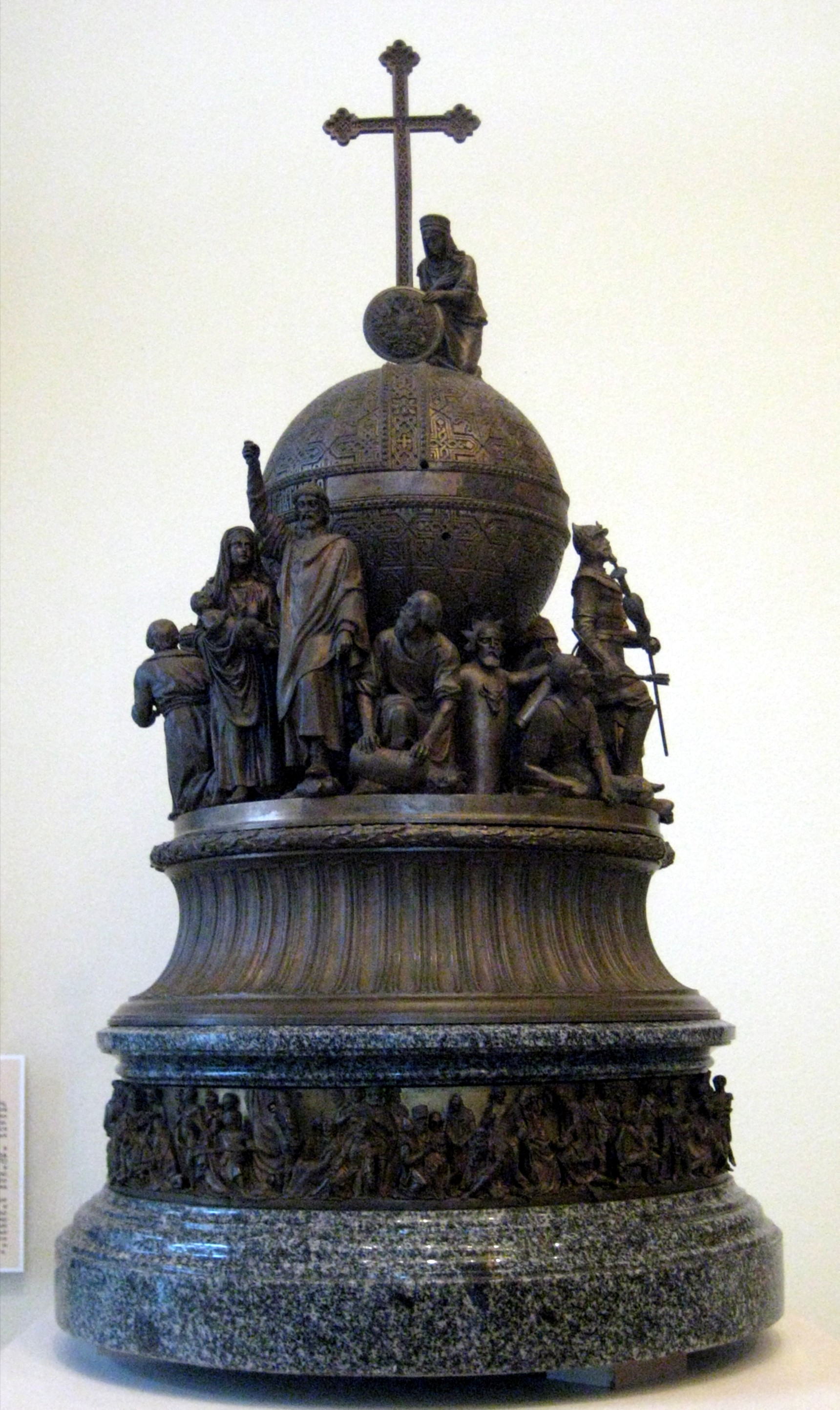 Model of sculpture Millennium of Russia. Cкульптура "Тысячелетие Руси". Модель в ГИМе